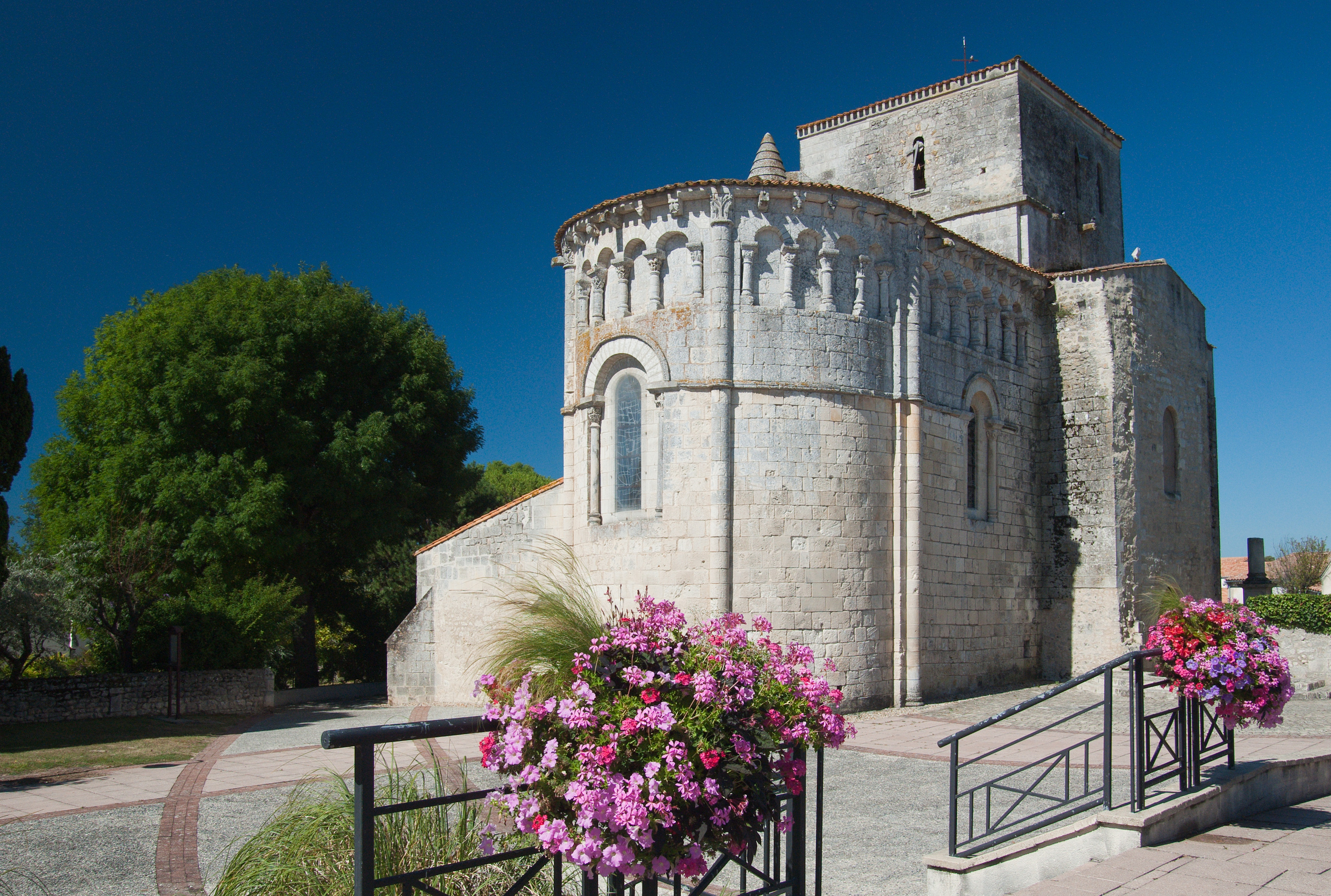 Eglise St Etienne à Vaux sur Mer .